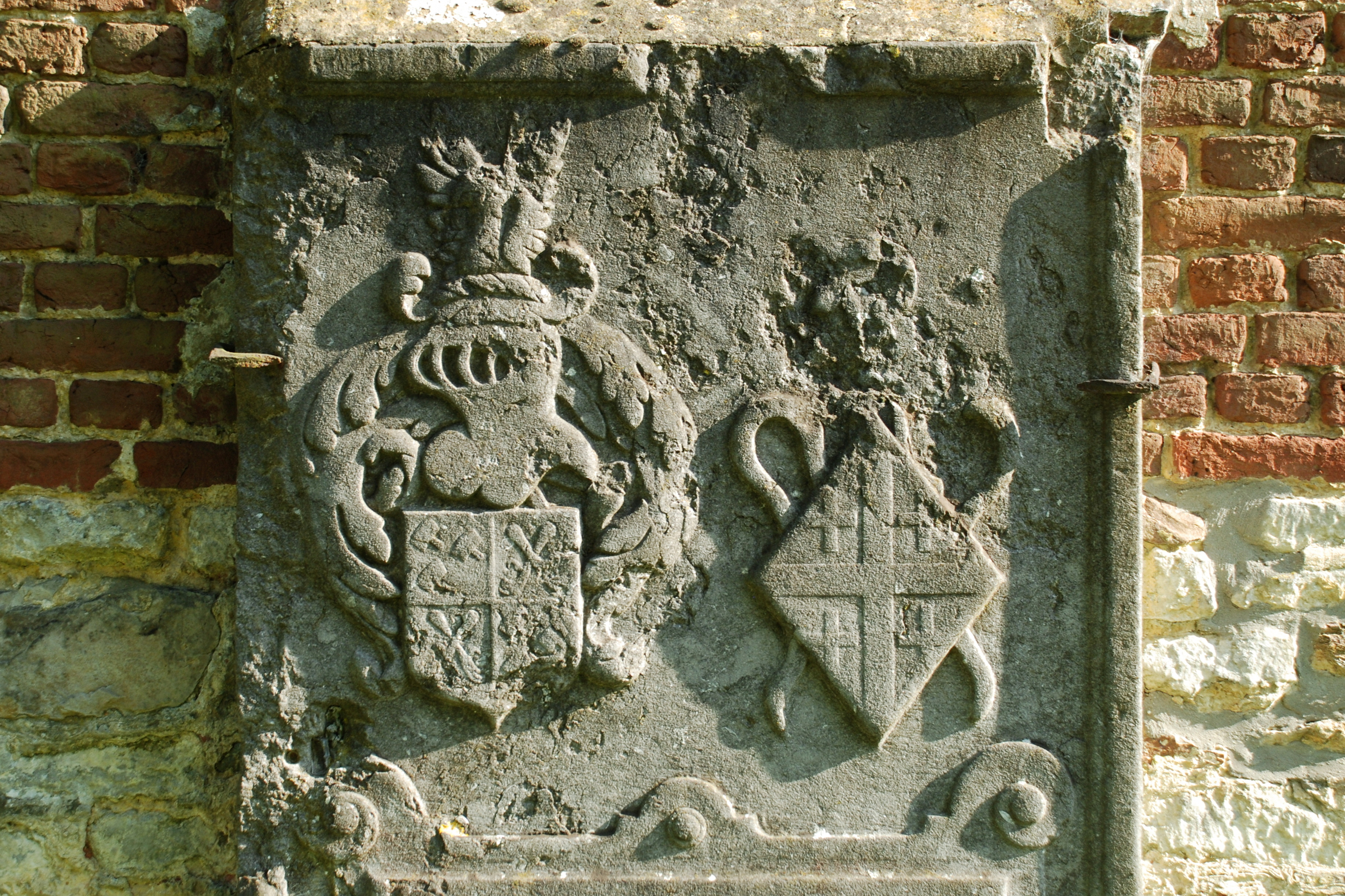 Belgique - Brabant wallon - Mont-Saint-Guibert - Église Saint-Pierre de Corbais - dalle funéraire de Jan de Pinchart (mort en 1604)